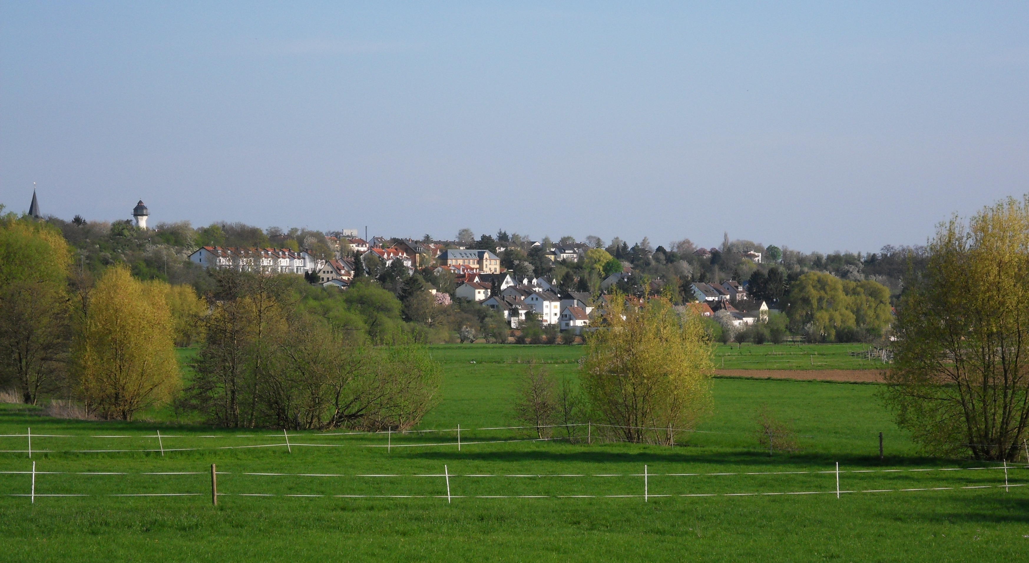 Blick vom Wäschbachtal bei Kloppenheim nach Südosten auf Wiesbaden-Igstadt